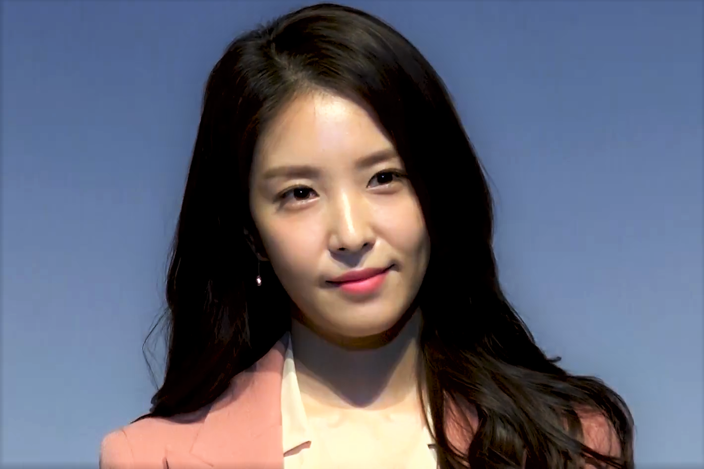 “행복을 나눠요” ... 보아, 얼굴만큼 예쁜 마음